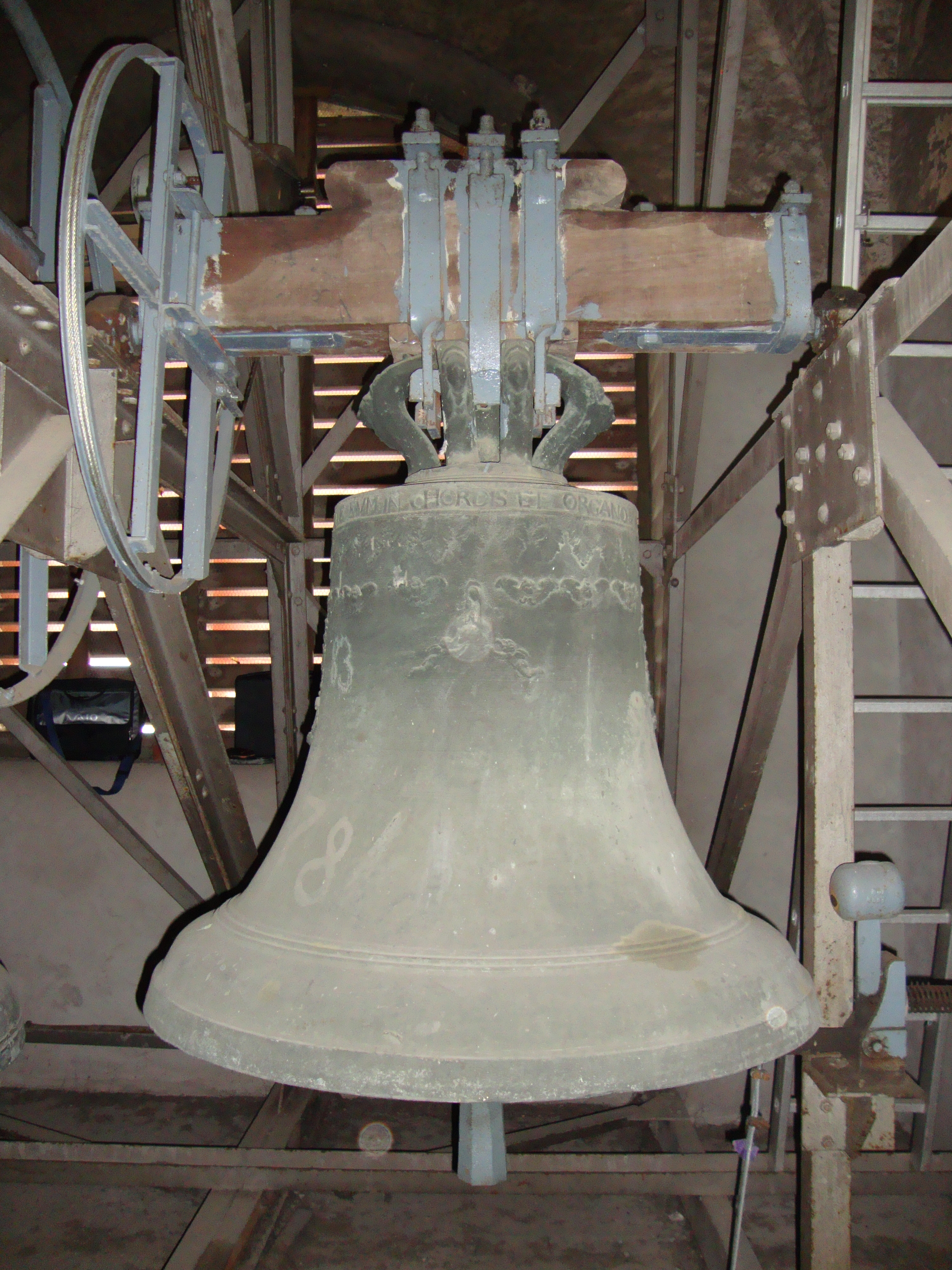 Bonn-Vilich, St. Peter: Glocke 2 von Michael Dormann, 1643, Ø 1053 mm, ~650 kg. Charakteristisch ist die sehr schlanke Form der Glocke.